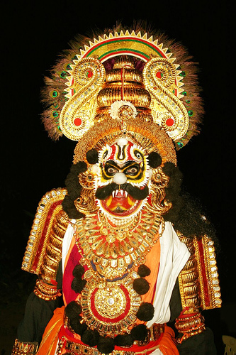 Rakshasa tel que représenté dans un spectacle Yakshagana (Karki Krishna Hasyagar)